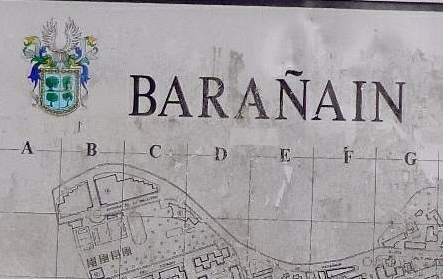 Paisaje urbano de Barañain (Navarra)